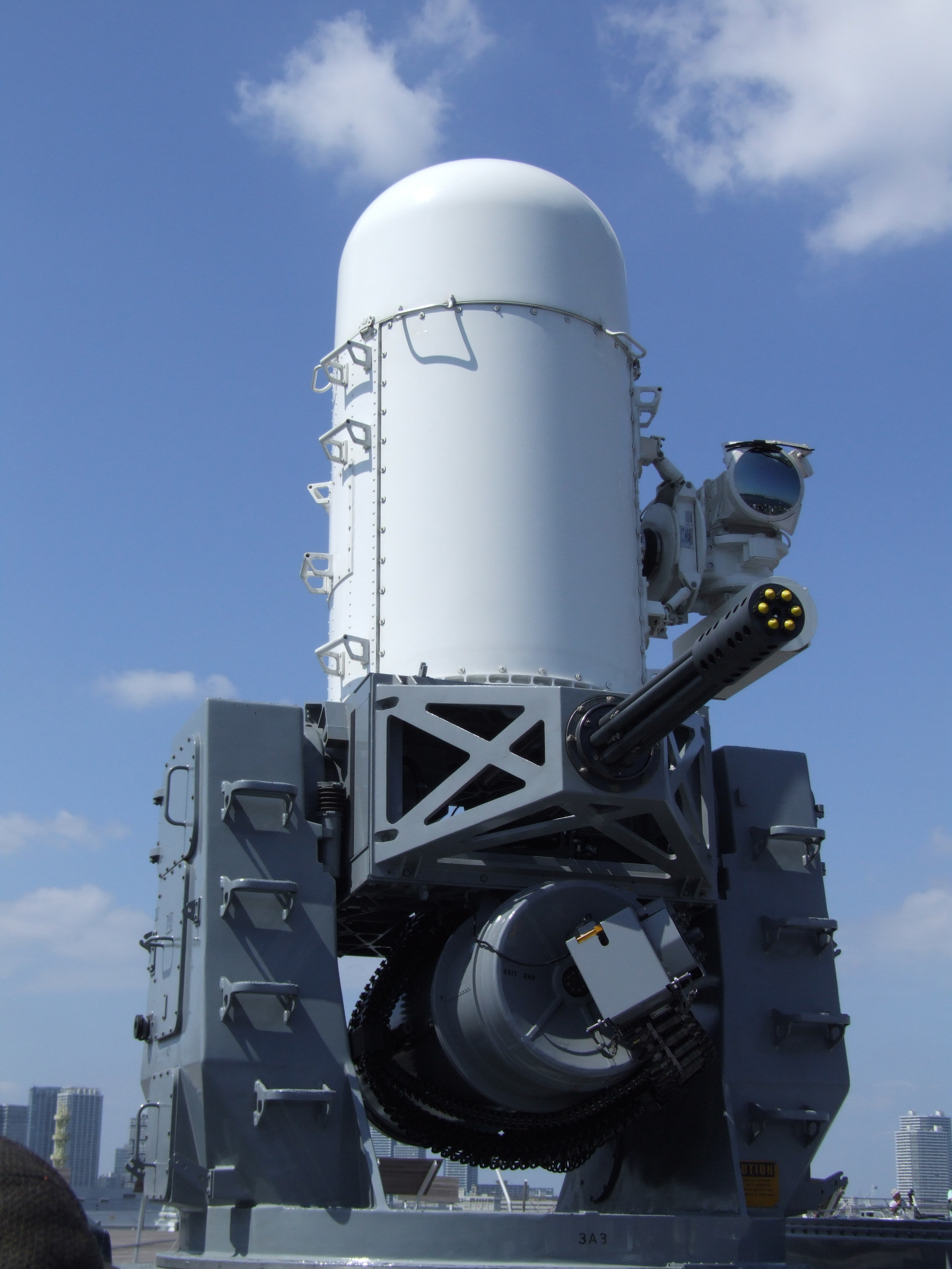 ひゅうがのファランクス(2009年横浜港開港150年での艦内開放にて撮影）